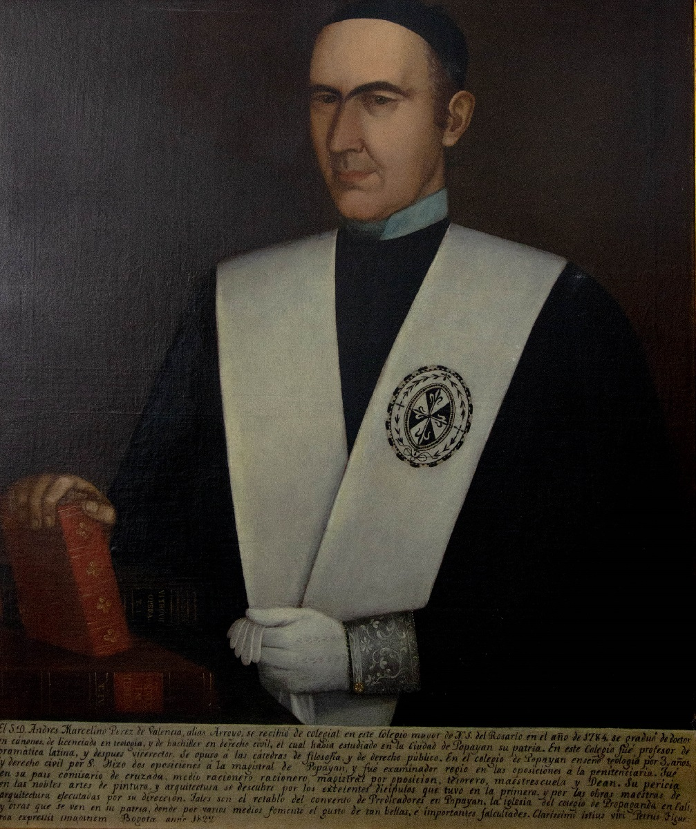 Retrato del presbítero Marcelino Pérez de Arroyo y Valencia